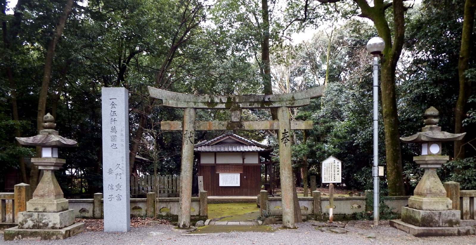 伊曽乃神社 古茂理神社